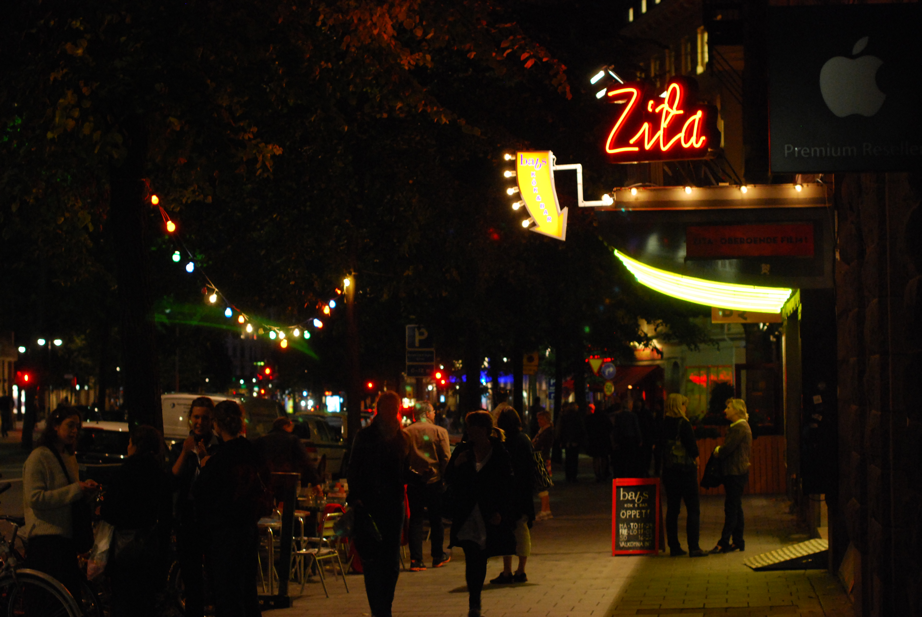 Biografen Zita, Birger Jarlsgatan 37, Stockholm